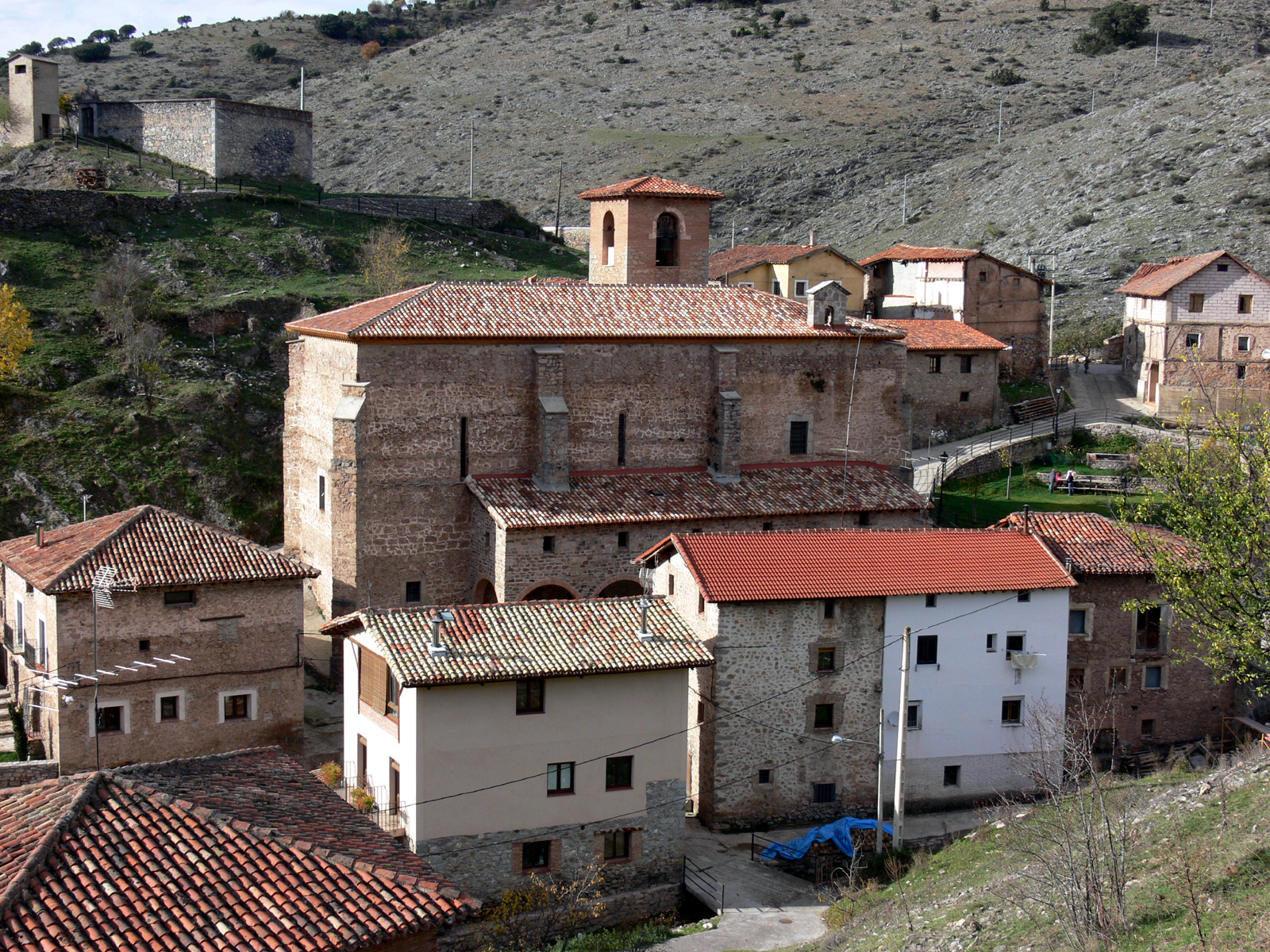 Iglesia de Nuestra Señora de la Asunción en Gallinero de Cameros, La Rioja - España.